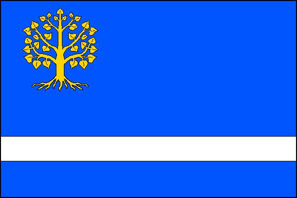 Vlajka obce Stará Paka